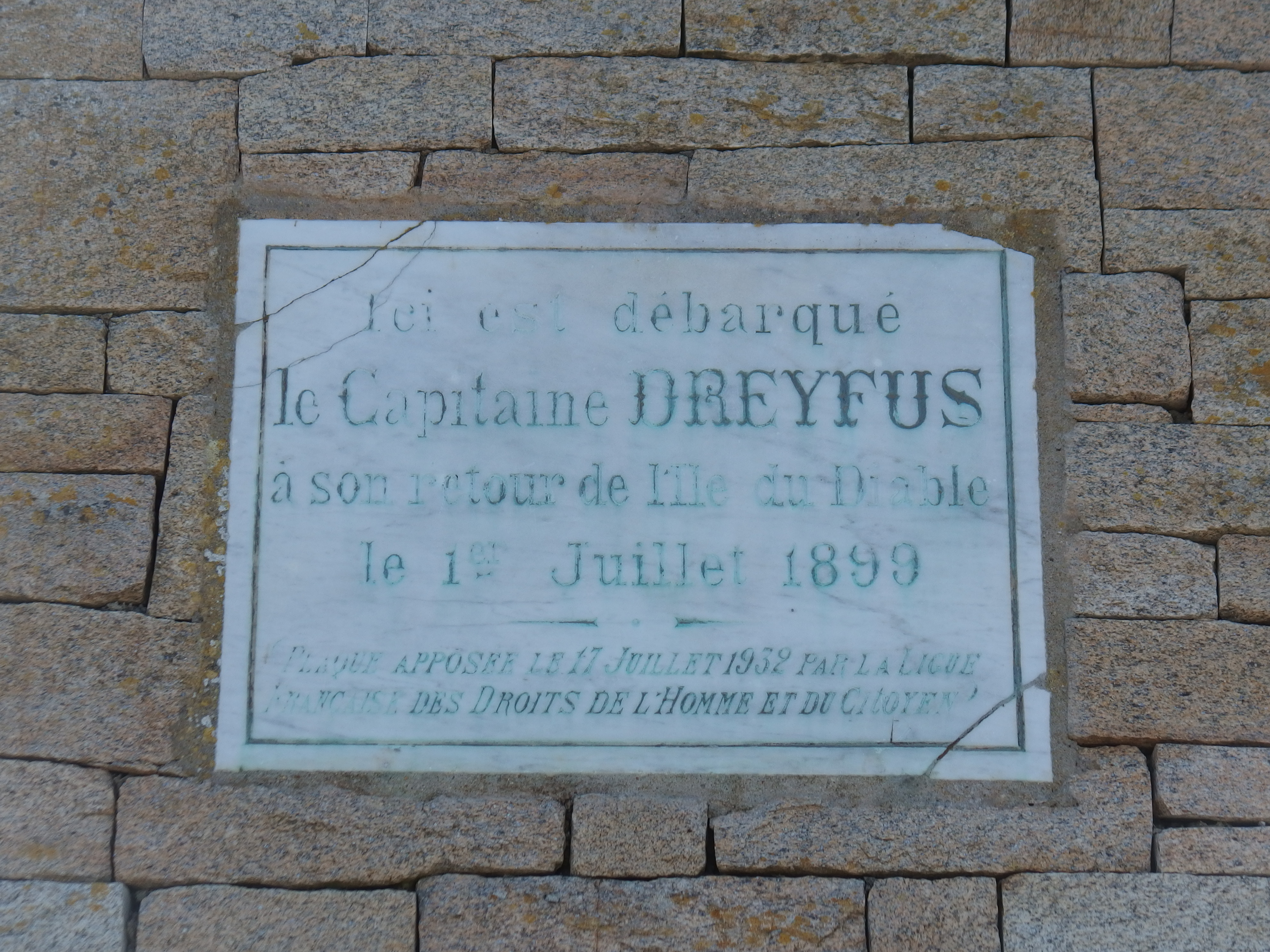 Plaque commémorant le retour d'Alfred Dreyfus de l'île du Diable (Guyane) le 1er juillet 1899, au Port-Haliguen de Quiberon. Plaque apposée le 17 juillet 1932 par la ligue française des droits de l'homme et du citoyen.